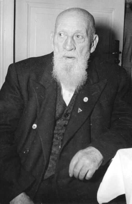 Zentralbild Köhler 24.09.1952. Veteranen der Arbeiterbewegung. Eugen Ernst, 86 Jahre alt. Seit 66 Jahren in der Arbeiterbewegung.